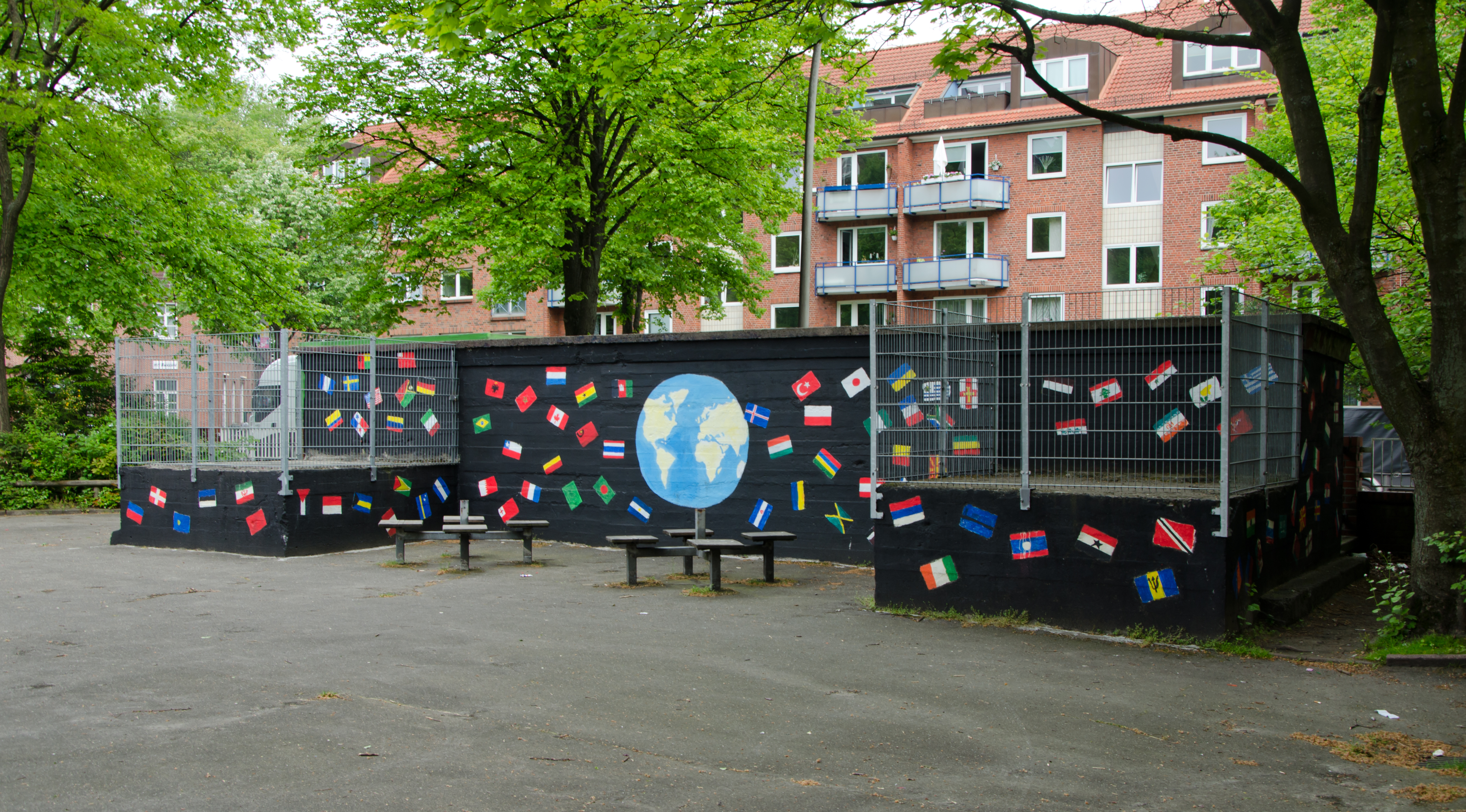 Schule Tieloh Bunkerzugang